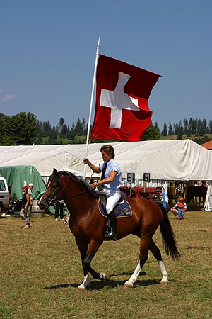 Marché-Concours 2004 à Saignelégier